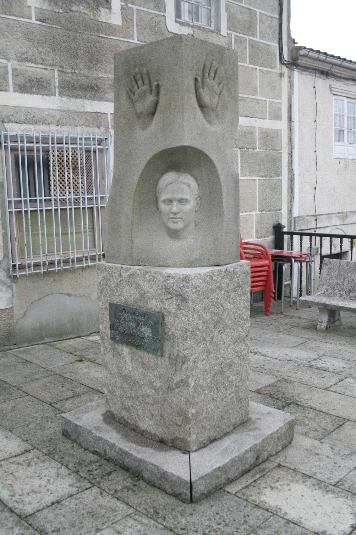 Monumento a la Libertad. En memoria a Miguel Angel Blanco. Xunqueira de Espadanedo Firma: G. CoutadoGalego: Monumento á Liberdade. En memoria a Miguel Angel Blanco. Xunqueira de Espadanedo Firma: G. Coutado